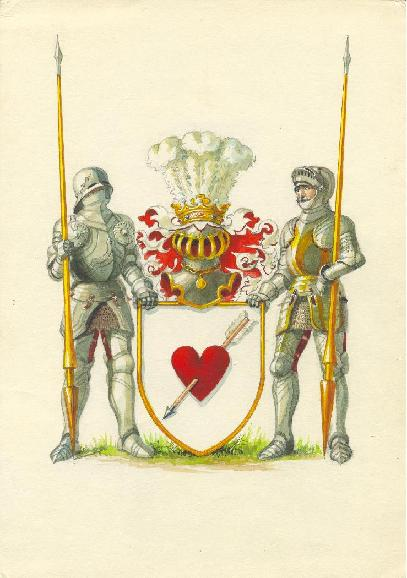 Герб рода Аксаковых